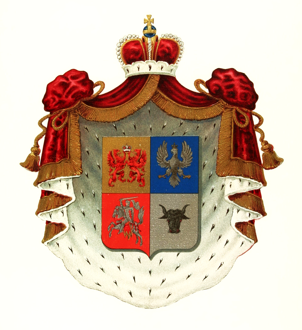 Герб рода князей Трубецких